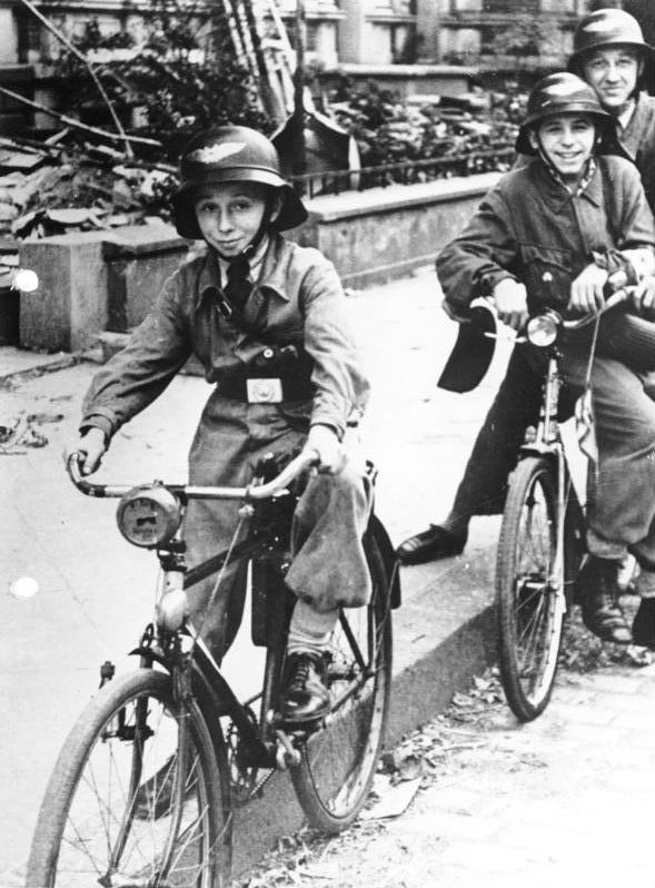 Meldefahrer, die die Verbindung zwischen Schadensstellen und Reviergruppen aufrecht erhalten.